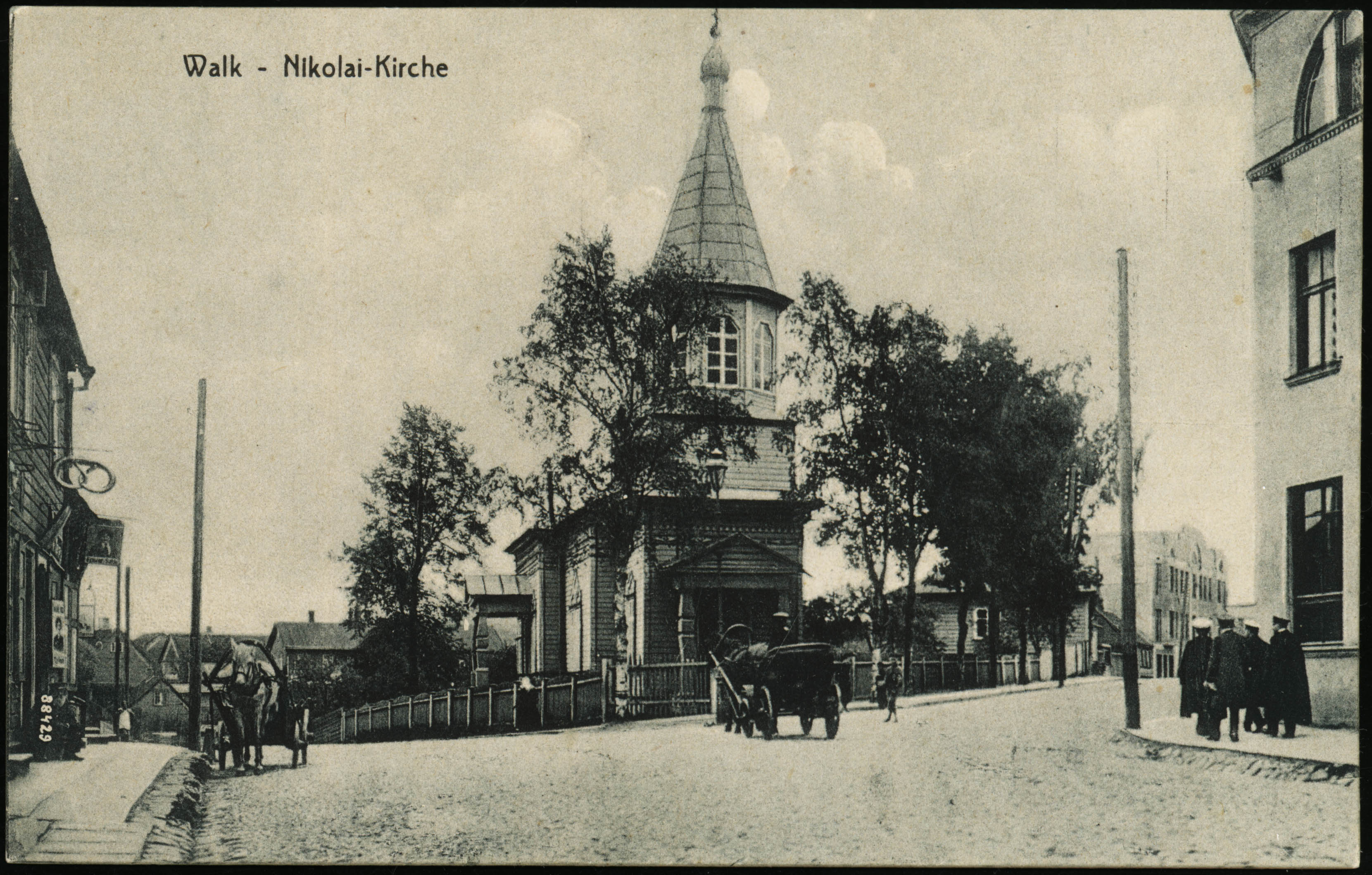 Muuseumikogu Fotokogu Muuseumikogu Fotokogu 20. saj algus linnaplaneerimine Eesti Valga